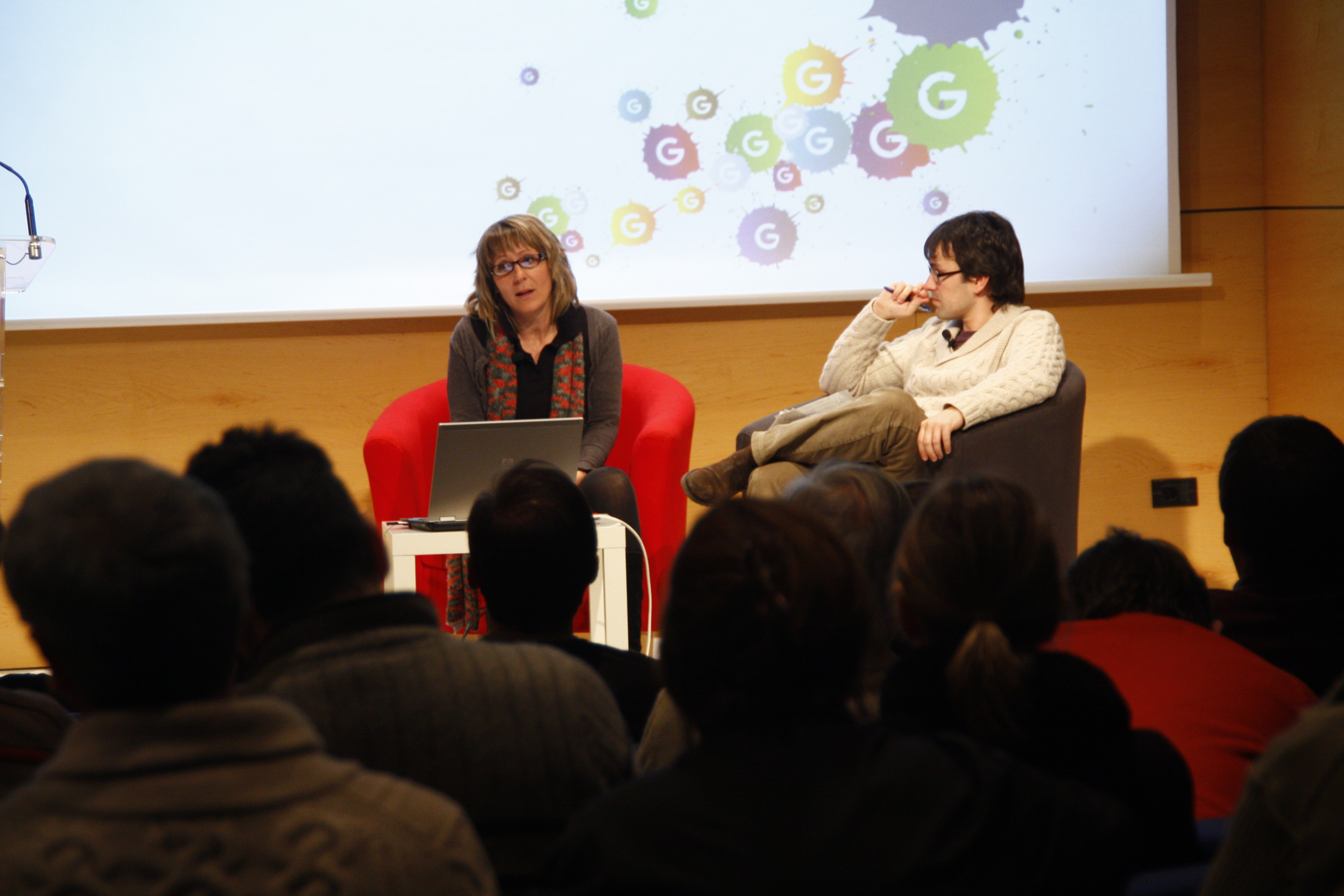 Aztiker ikerguneko Susana Martinez eta Gipuzkoako Foru Aldundiko Kultura eta Euskara Departamentuko kultur sustapen eta hedapenerako zuzendari zen Haritz Solupe Gipuzkoa 2.0 Elkarlanean eztabaida prozesuaren ondorioen berri ematen KMko areto nagusian.